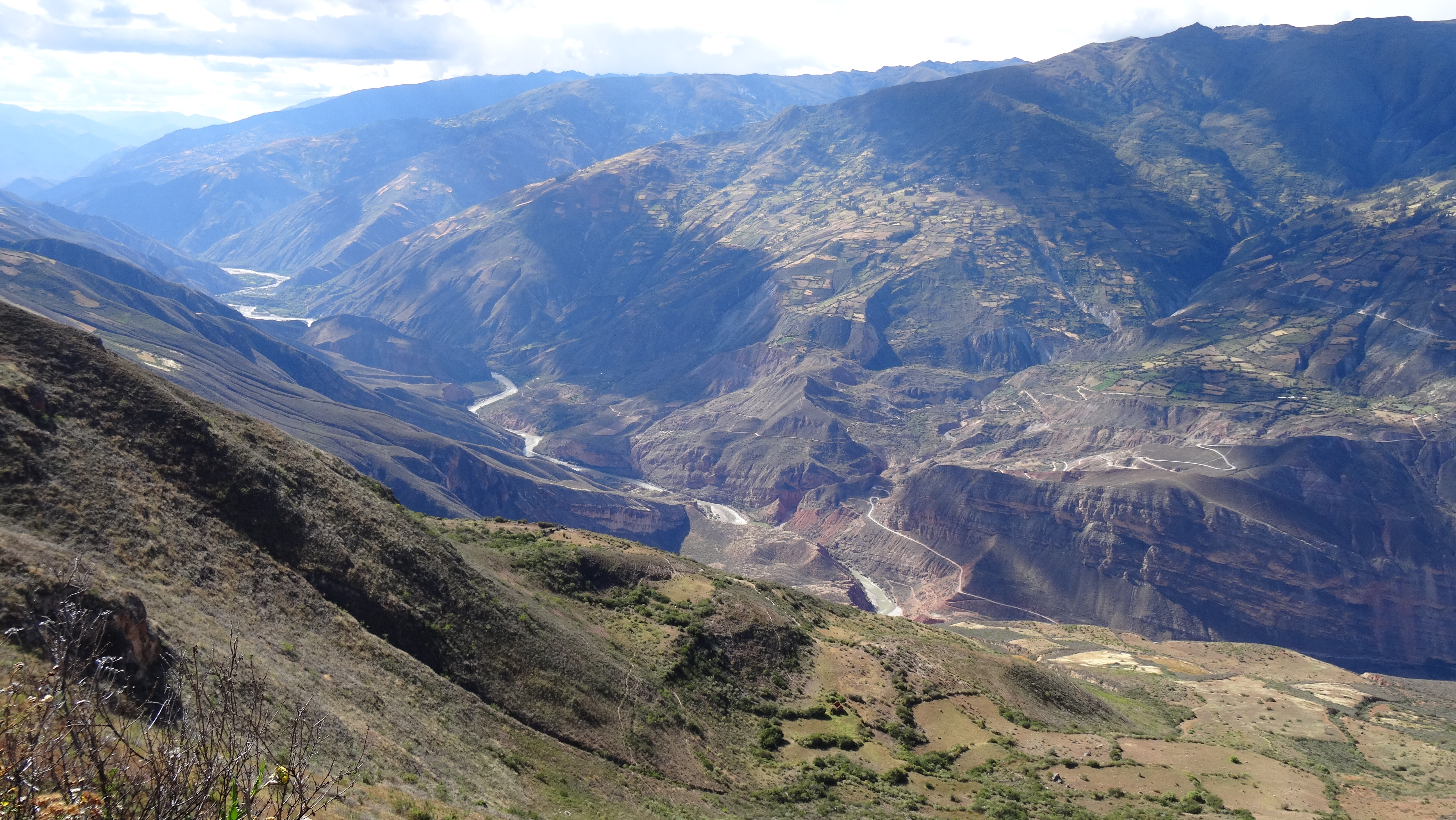 Río Marañón visto desde la montaña Yarkan, entre los departamentos de Áncash y Huánuco.